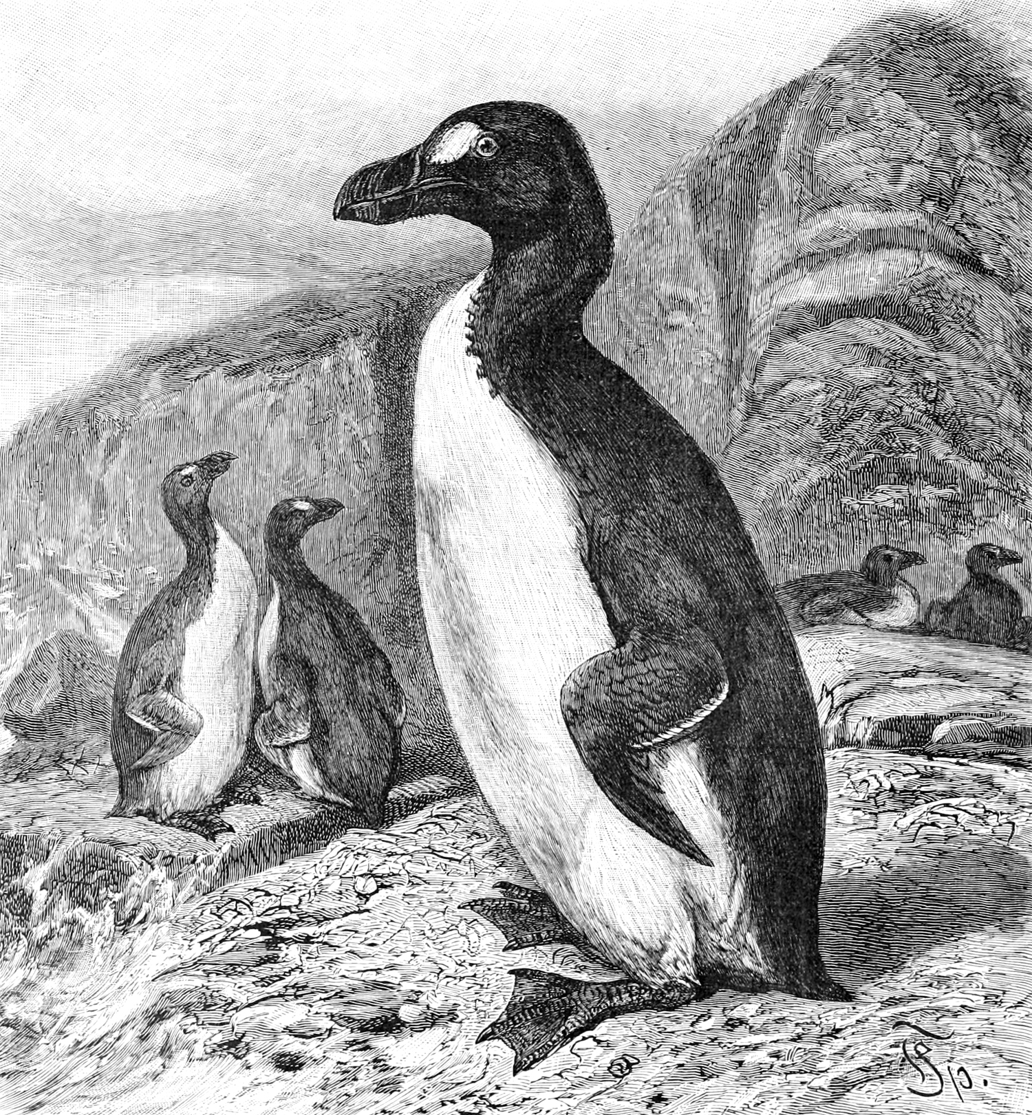 Pinguinus impennis